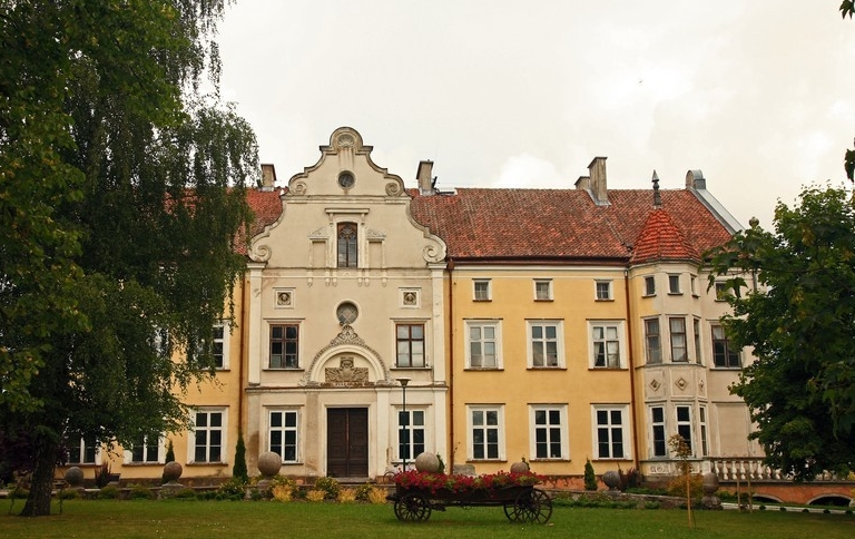 Łabędnik – wieś w woj. warmińsko-mazurskim, w powiecie bartoszyckim, w gminie Bartoszyce